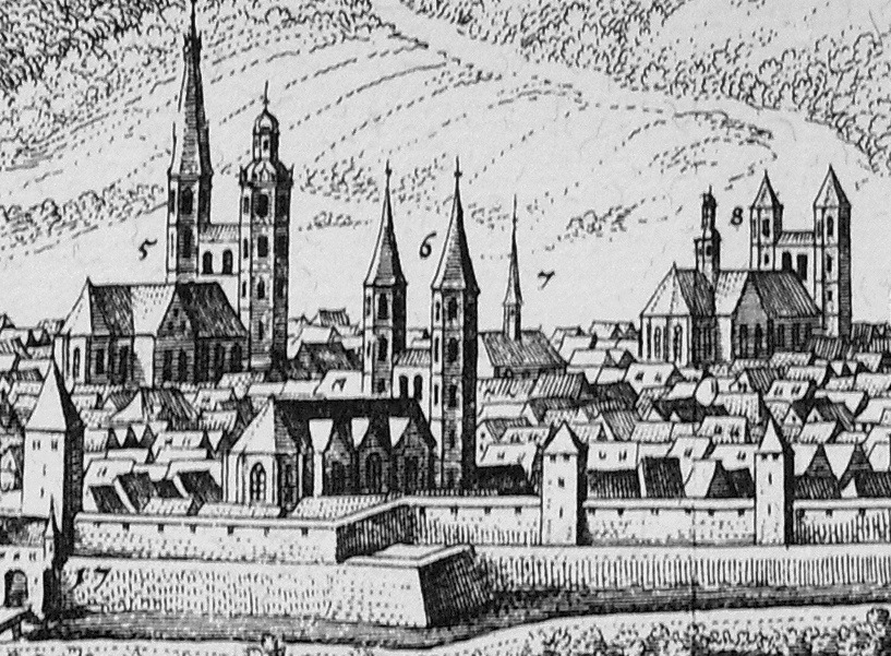 Matthäus Merian, Goslar (1653), Ausschnitt: (5) Marktkirche St. Cosmas und Damian, (6) Neuwerkkirche, (7) St. Thomas, (8) Stiftskirche St. Simon und Judas (Dom), (17) Rauschentor (Rosentor)